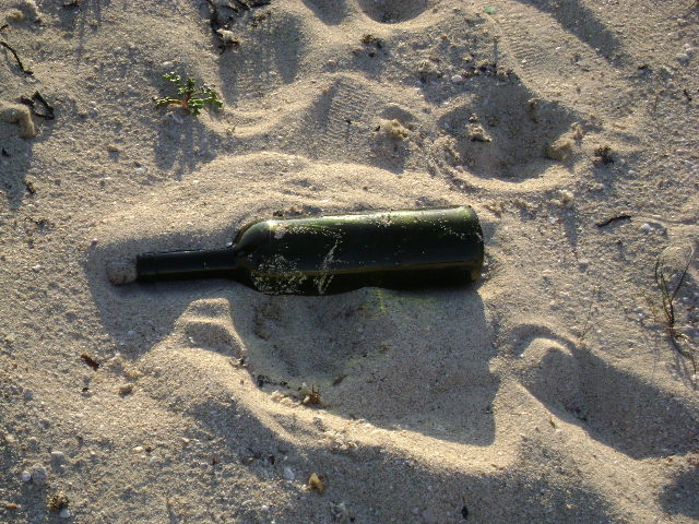 A bottle